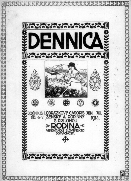 Časopis Dennica vychádzal na Slovensku pred 1. svetovou vojnou. Vydávala ho Terézia Vansová.